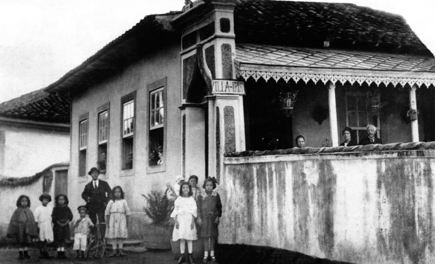 Fotografia da casa onde residiu Bárbara Heliodora, poetisa esposa de Alvarenga Peixoto